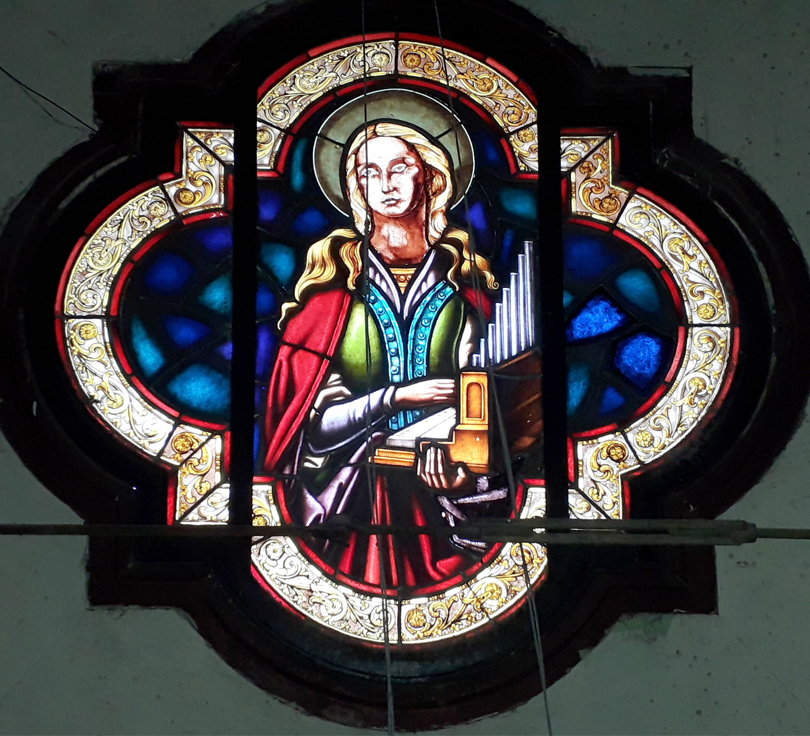 Vitral de Santa Cecilia en el Coro de la Parroquia de San José de Jatibonico.